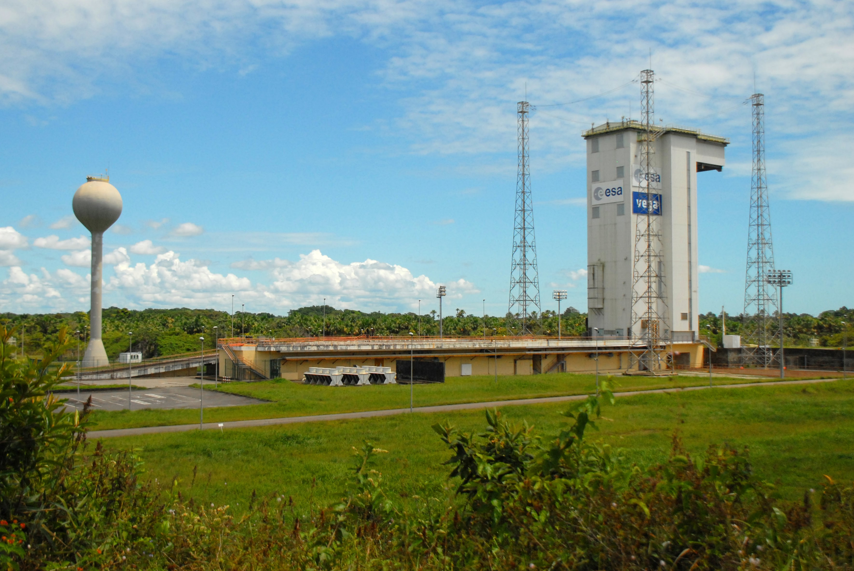 Ensemble de lancement Vega au centre spatial guyanais de Kourou